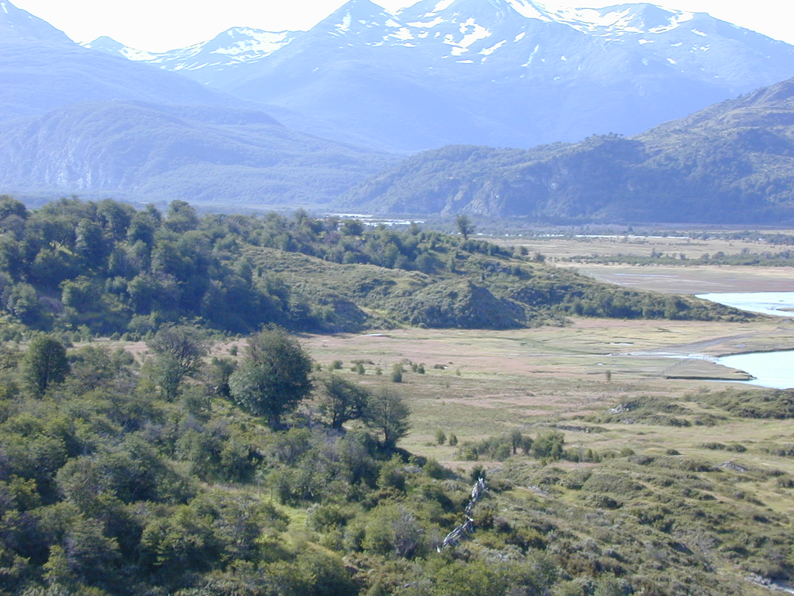 Vista parcial del valle del río Yendegaia, en la parte chilena de la Tierra del Fuego.